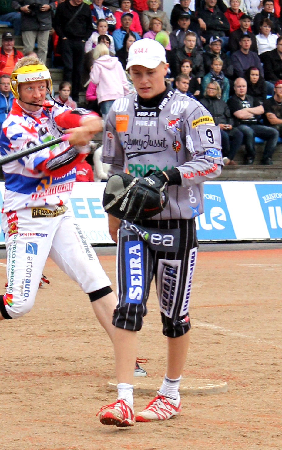 JymyJussien pelaaja pelaamassa pesäpalloa elokuussa 2013